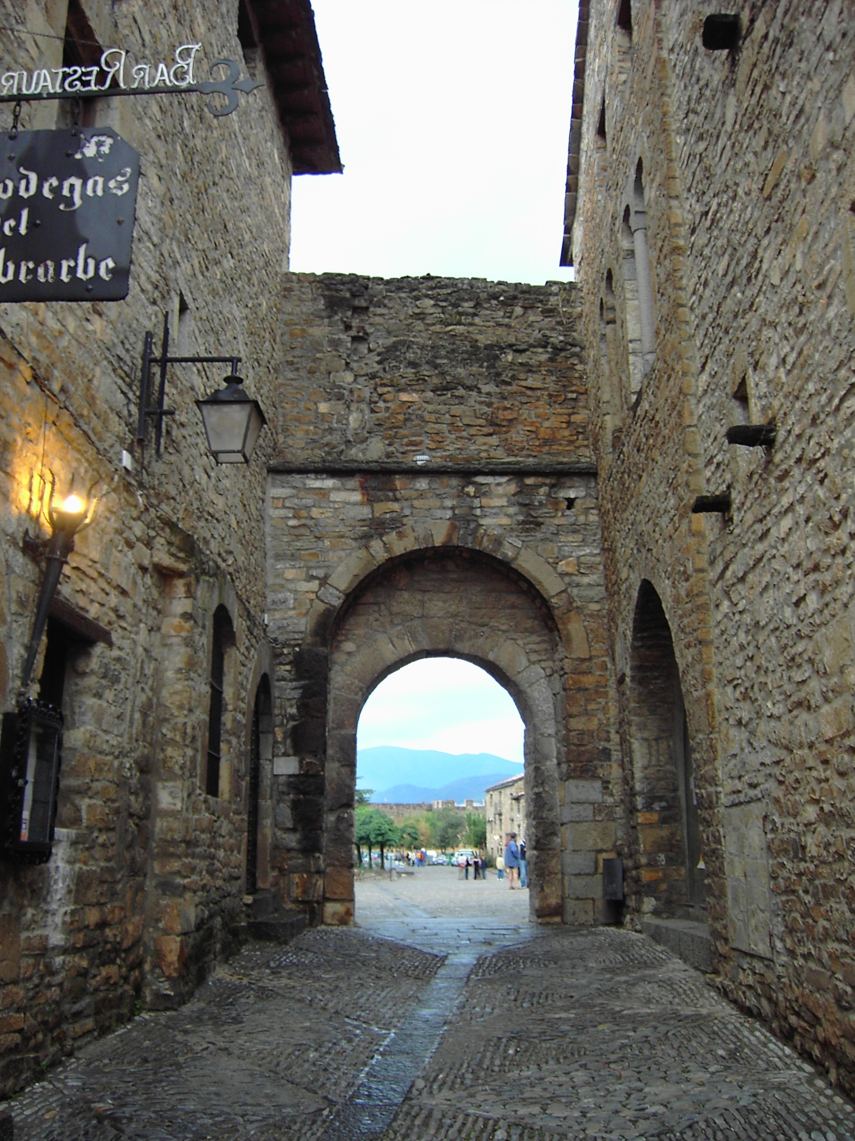 Acceso a la plaza de l'Aínsa a través de una d elas puertas de la doble muralla que antiguamente protegía el casco urbano de la villa.